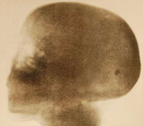 Skallbild på en örebroare som utsatts för ett attentat med revolverskott genom vänster öga in i hjärnan, varvid kulan kunde lokaliseras. Kulan kunde opereras bort vid Akademiska sjukhuset i Uppsala och läkningen skedde utan komplikationer. Fallet är förmodligen det första i historien där en kula uttagits ur hjärnan efter lokalisering med röntgenbilder